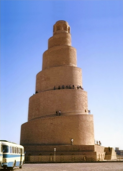 Samarra, spiralovity minaret